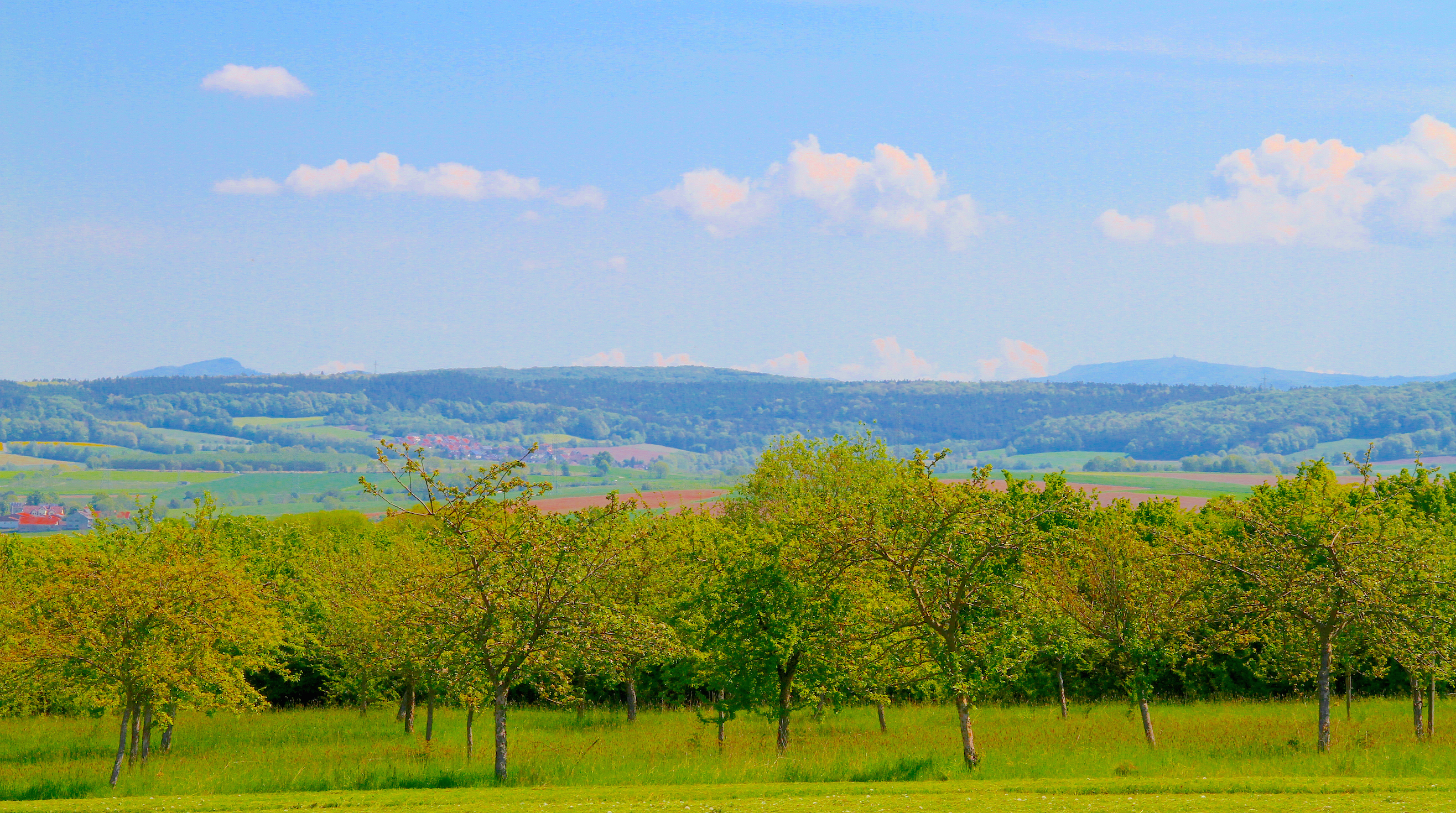 Flieden/Rückers - Streuobstwiese auf dem Eisenküppel, im Hintergrund die Hohe Rhön mit der Milseburg und der Wasserkuppe